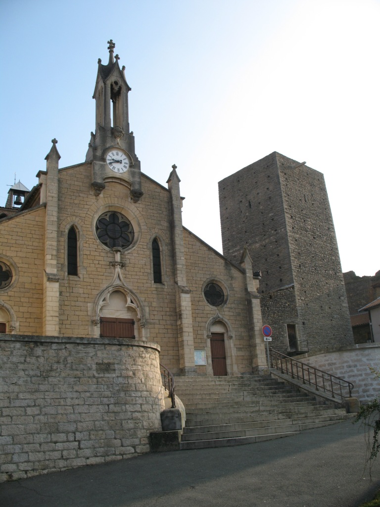 Photo de l'église de St Germain au Mont d'Or